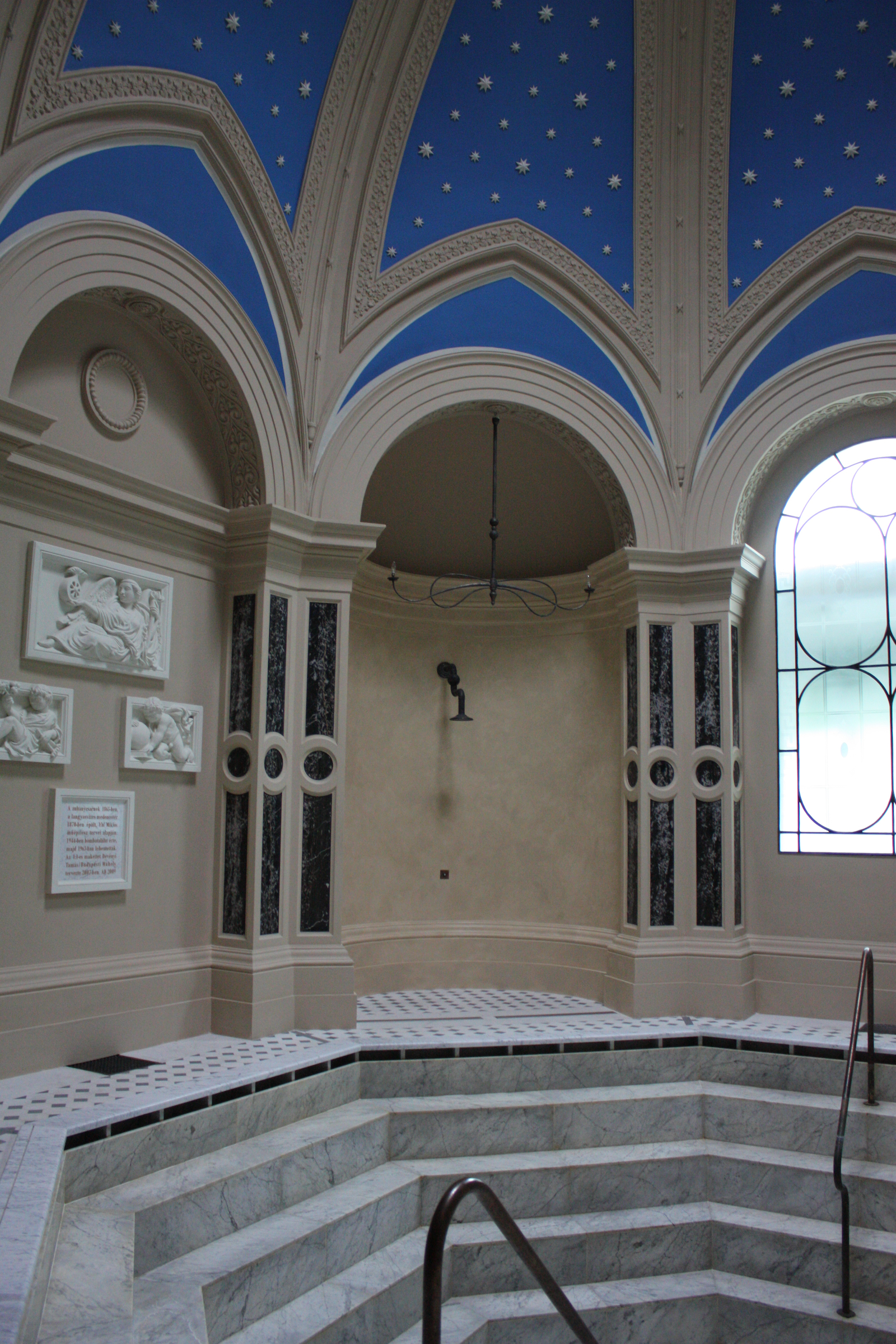 Rácz Fürdő